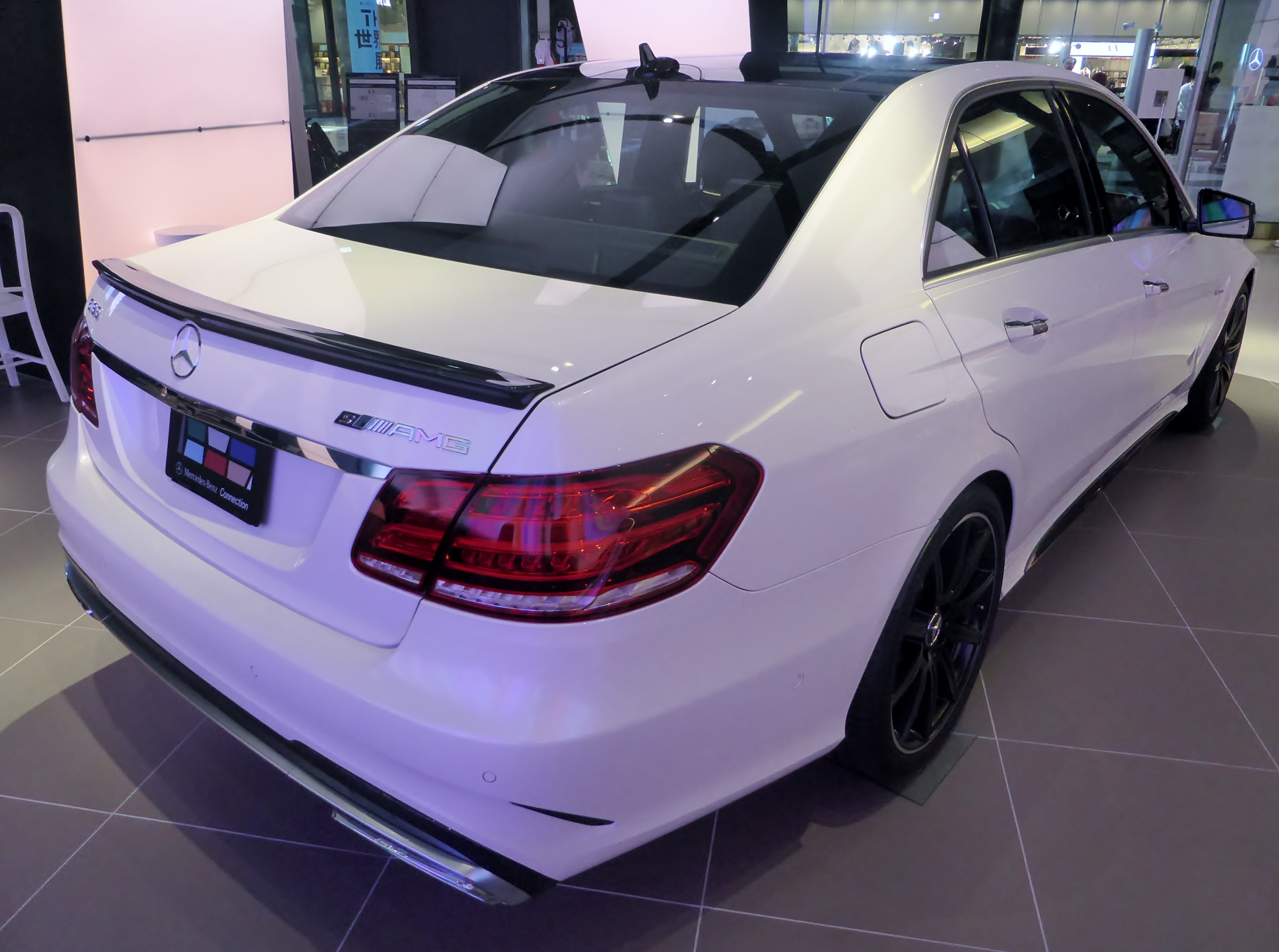 W212型メルセデス・ベンツE63 AMG Sをリアから撮影。